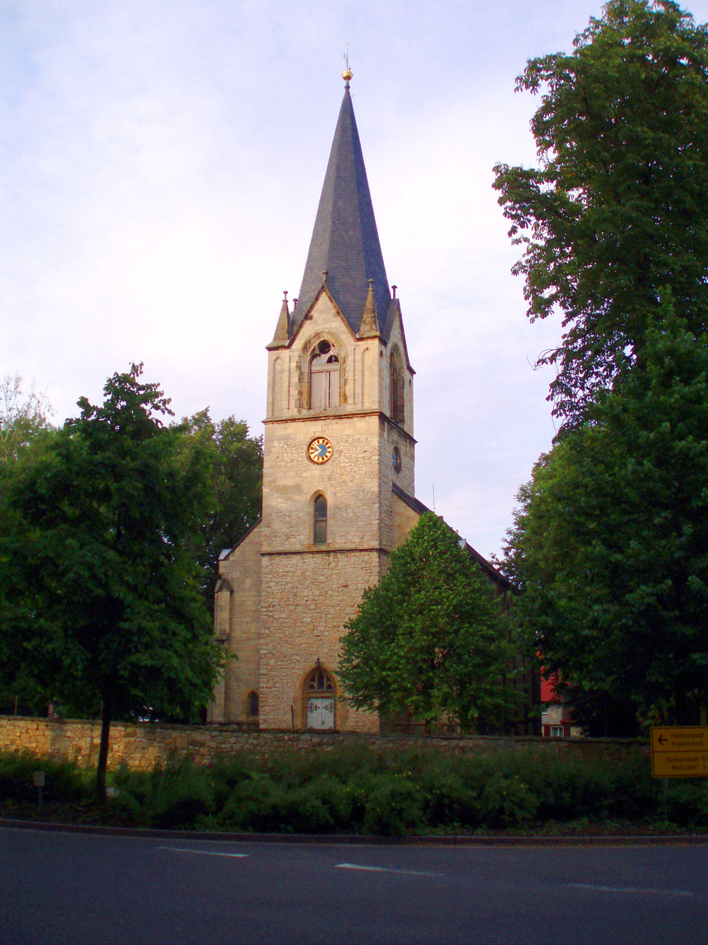 Evang. Kirche Ströbeck